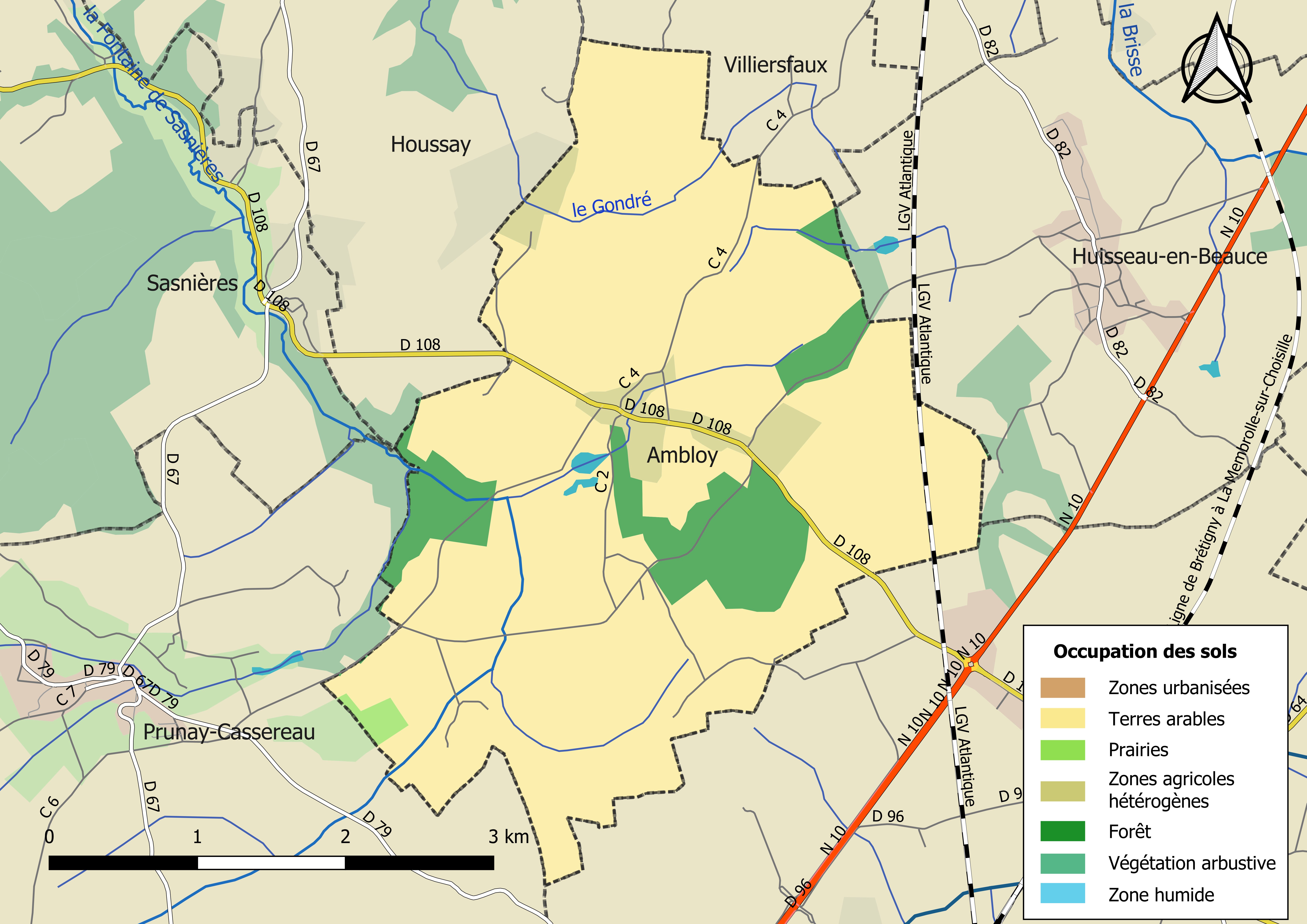 Carte des infrastructures et de l’occupation des sols en 2018 de la commune de Ambloy (France).